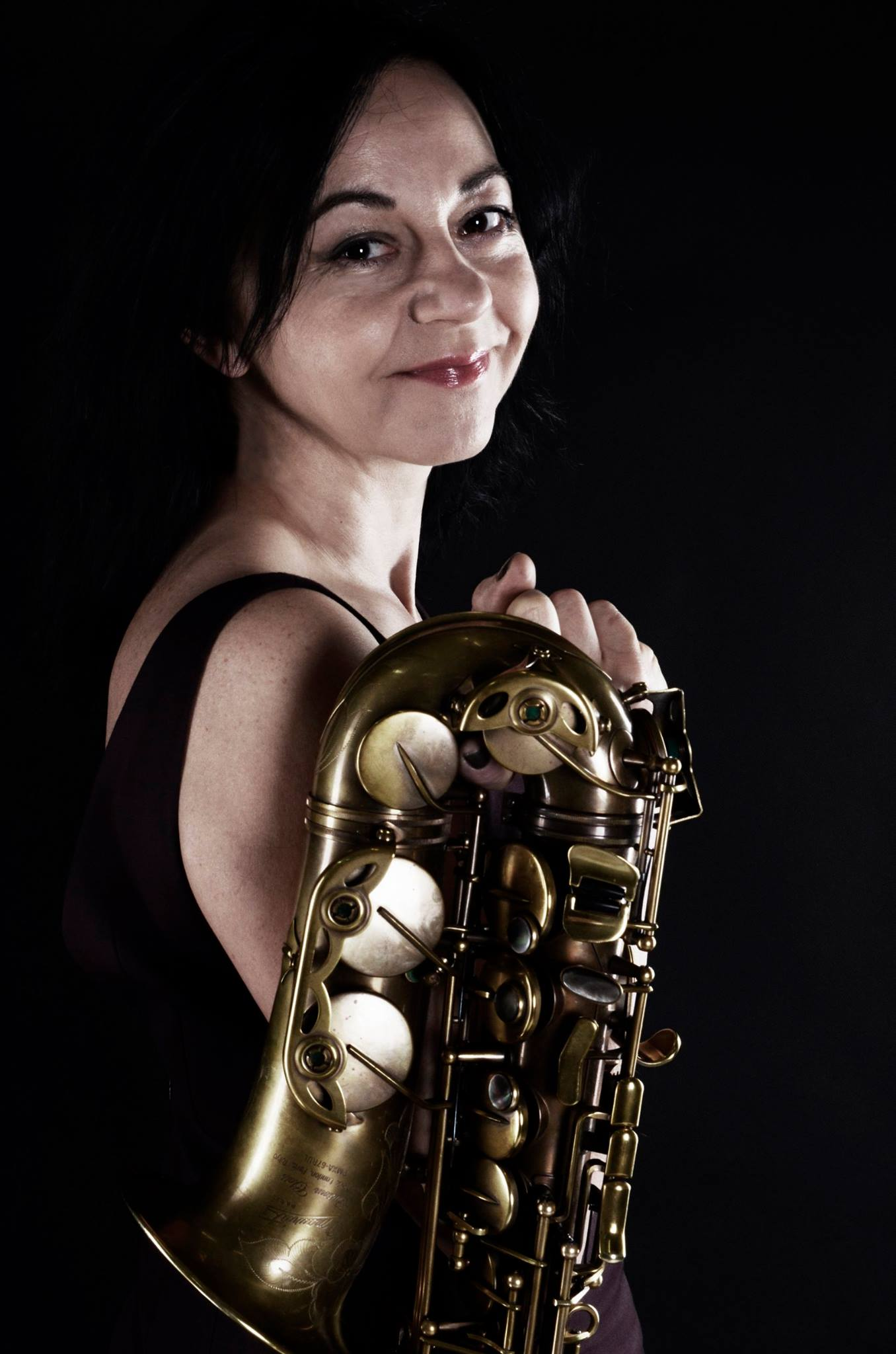 Jako solistka w klasycznym repertuarze na saksofon i orkiestrę symfoniczną koncertuje z najlepszymi polskimi orkiestrami m.in. Sinfonia Varsovia, z którą odbyła turnee po Niemczech jako solistka w koncercie na saksofon i orkiestrę smyczkową A. Głazunowa. Współpracowała z wieloma wybitnymi dyrygentami takimi jak Jacek Kaspszyk, Roman Kofman, Hermann Breuer, Michał Dworzyński, Paweł Kotla. José Maria Florêncio. Bierze udział w projektach związanych z muzyką improwizowaną, alternatywną, jazzem i ethno.